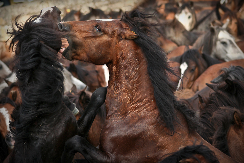 A rapa das bestas de Sabucedo - Mordisco - Bite